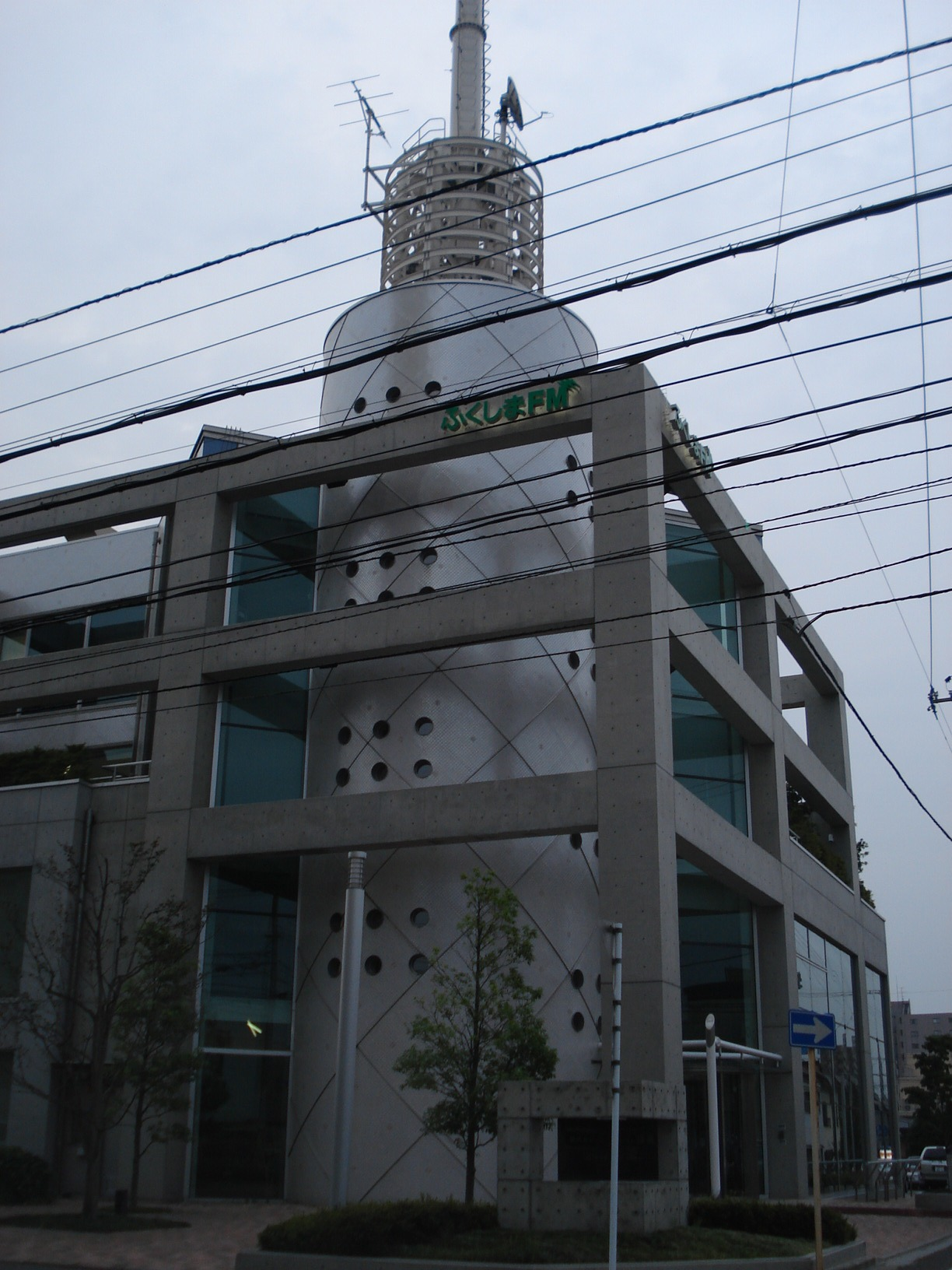 エフエム福島本社社屋…福島県郡山市神明町4番4号